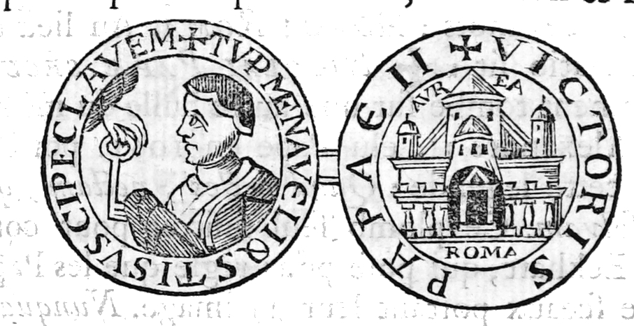 extrait de "Nouveau traité de diplomatique...".